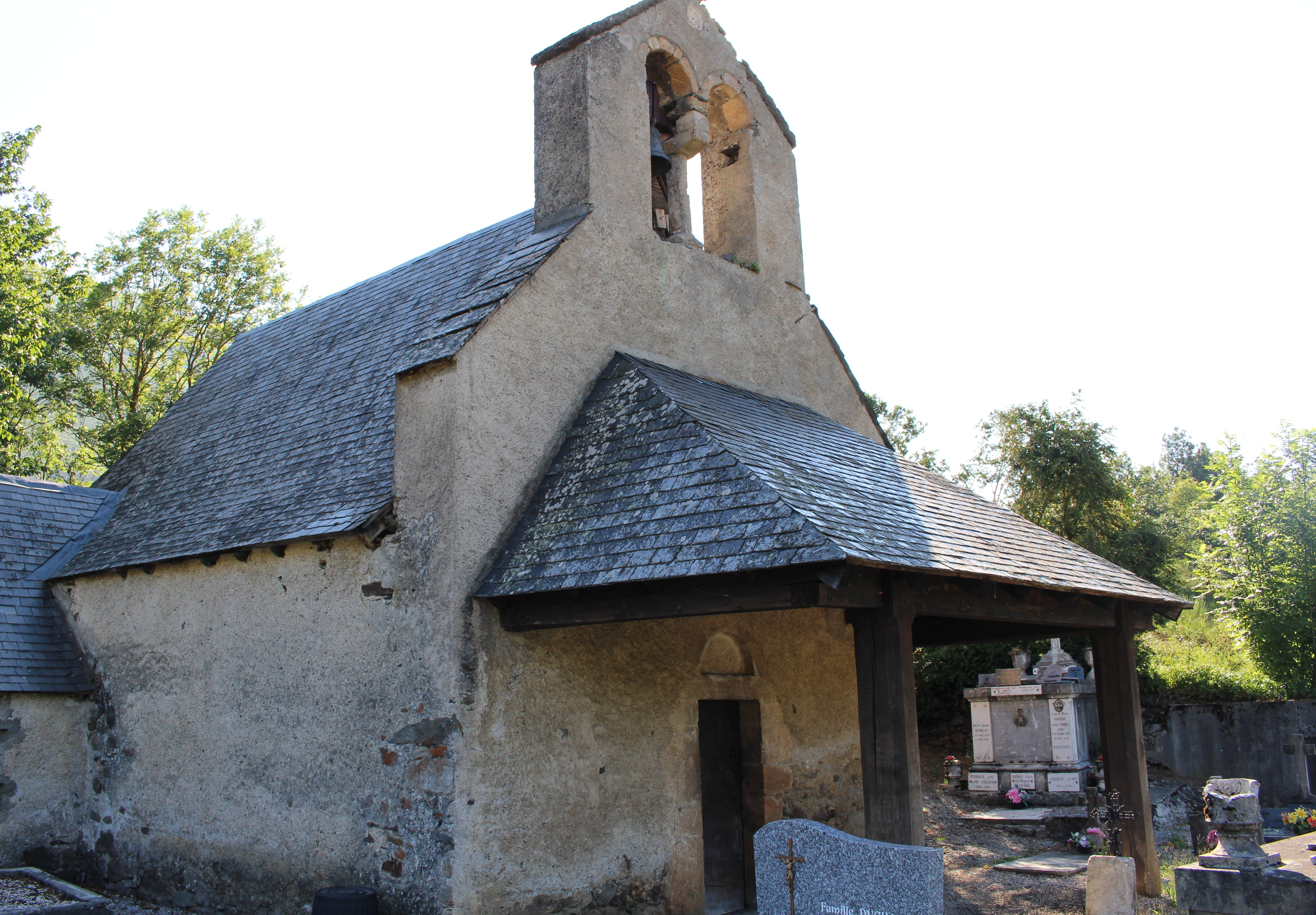 Église Saint-Étienne de Pailhac (Hautes-Pyrénées)